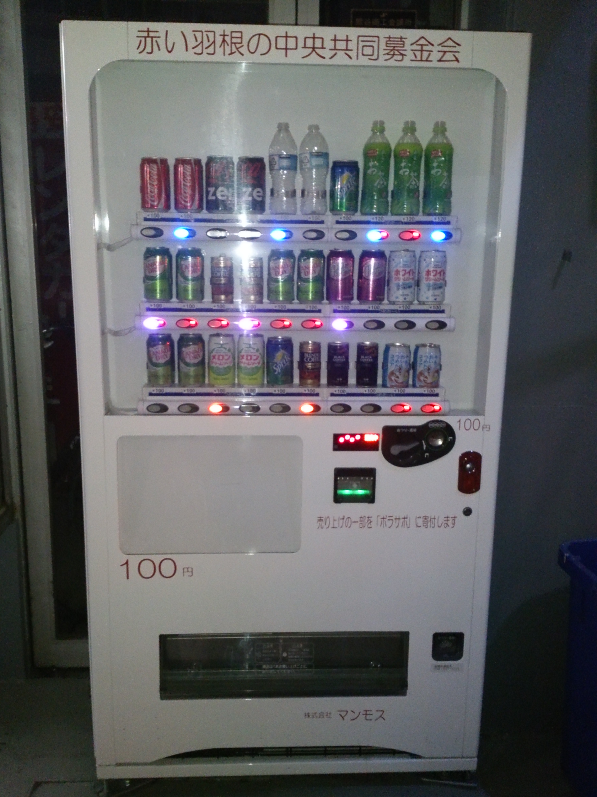 ただでさえ安いのにその中から一部寄付に回してるらしい。